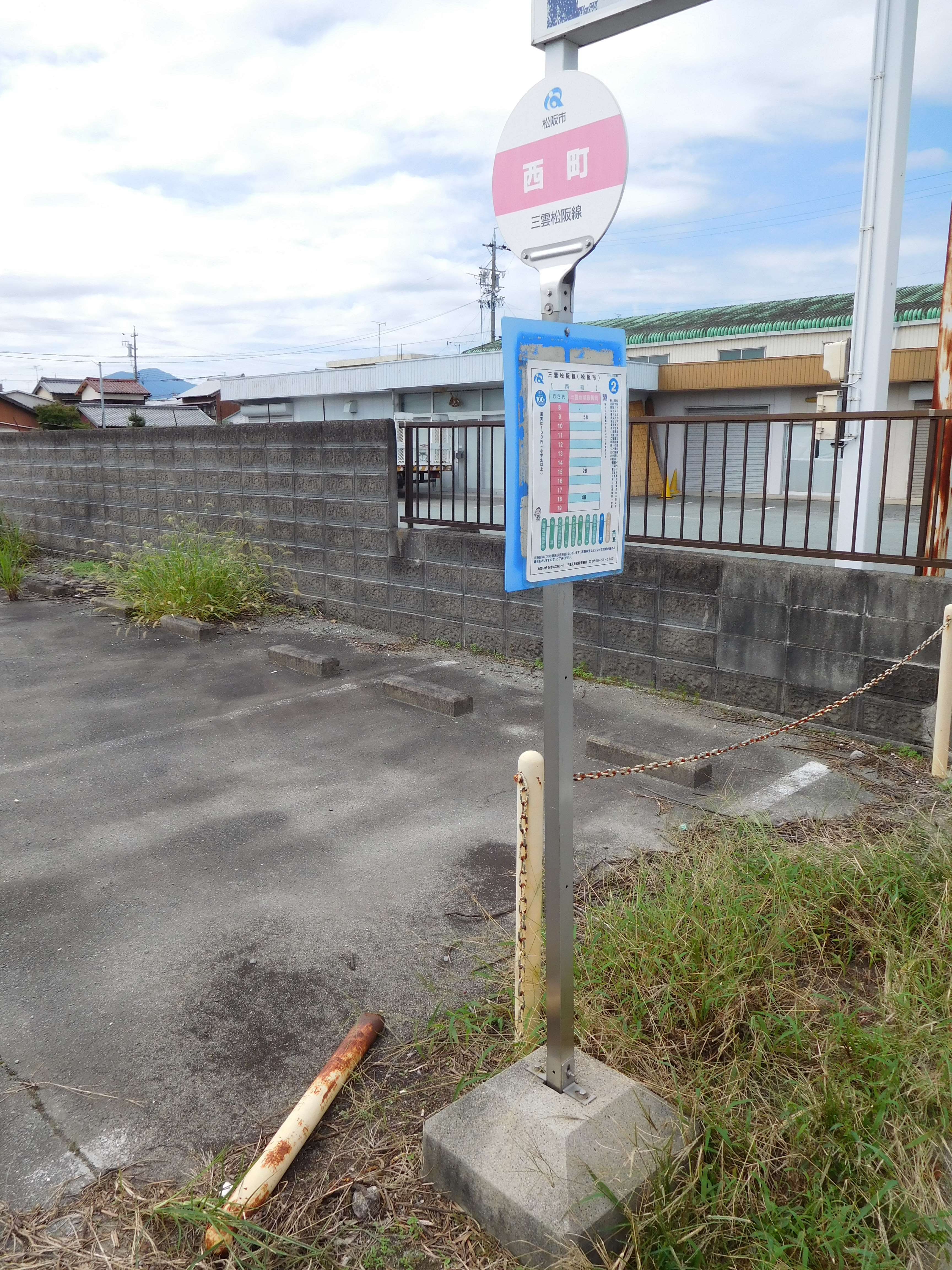 三重県松阪市西町にある、松阪市のコミュニティバス「三雲松阪線」西町バス停。